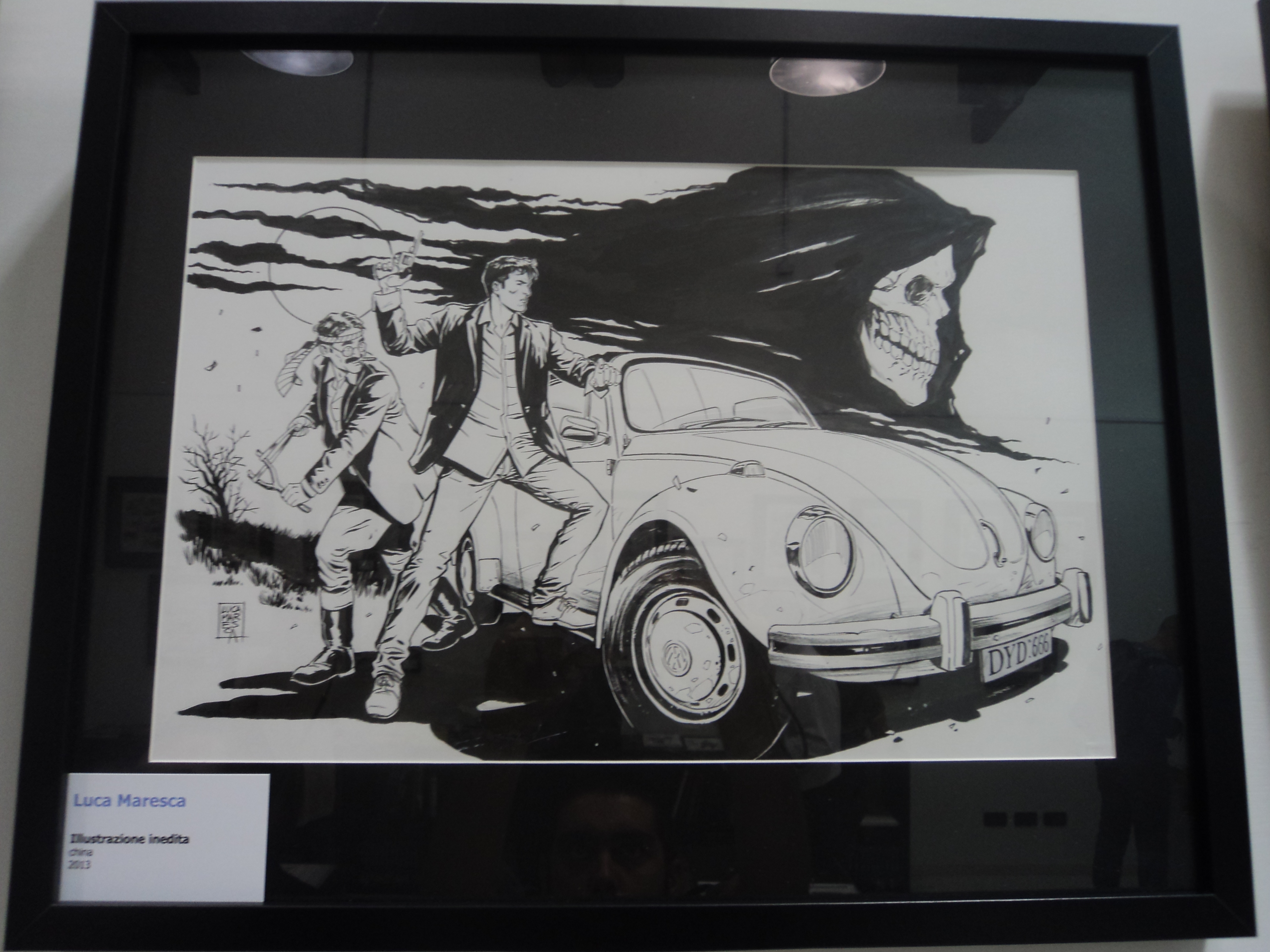 Mostra "Dylan Dog e motori: gioie e orrori"